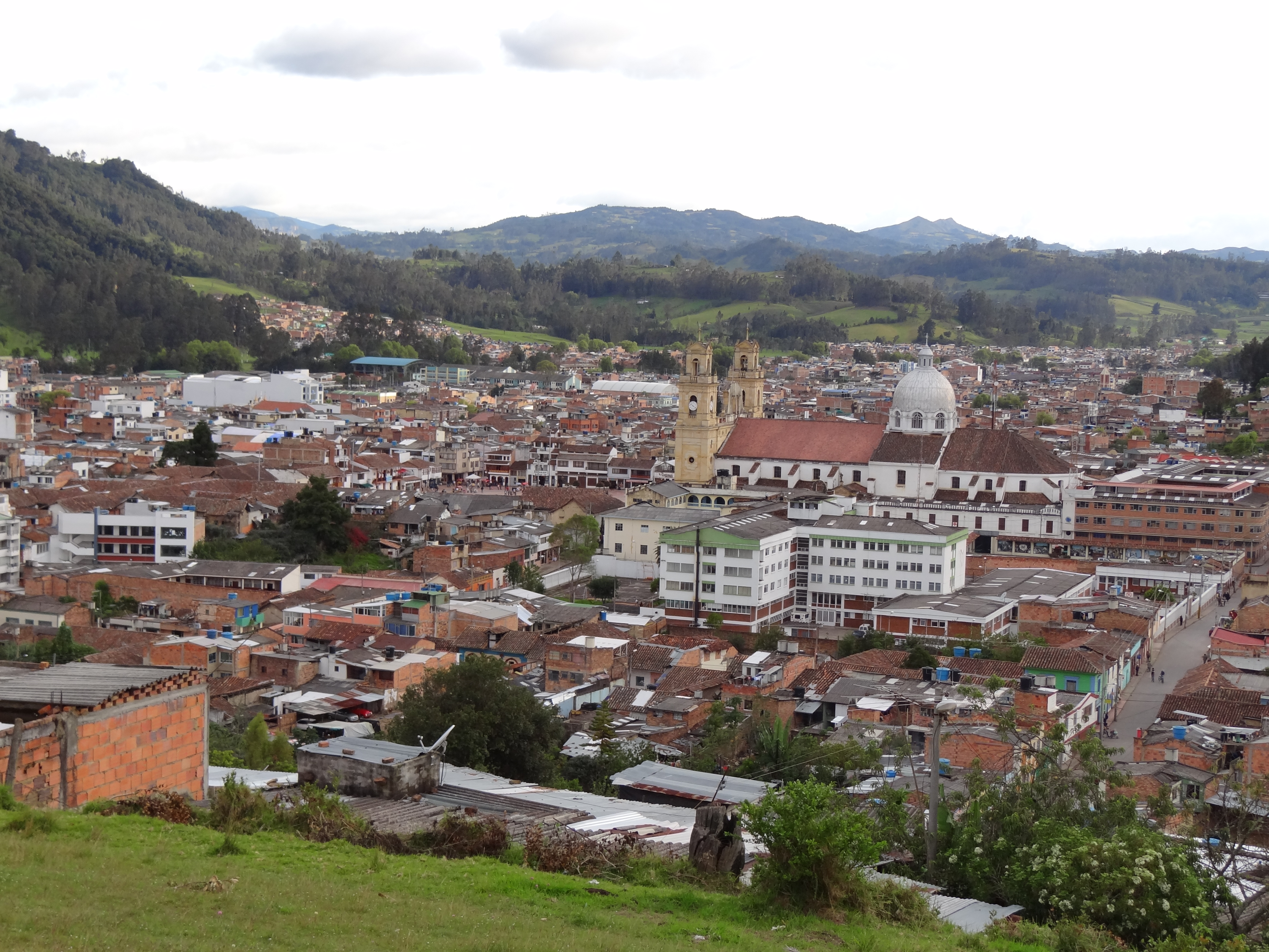 Centro de Chiquinquirá, departamento de Boyacá, Colombia